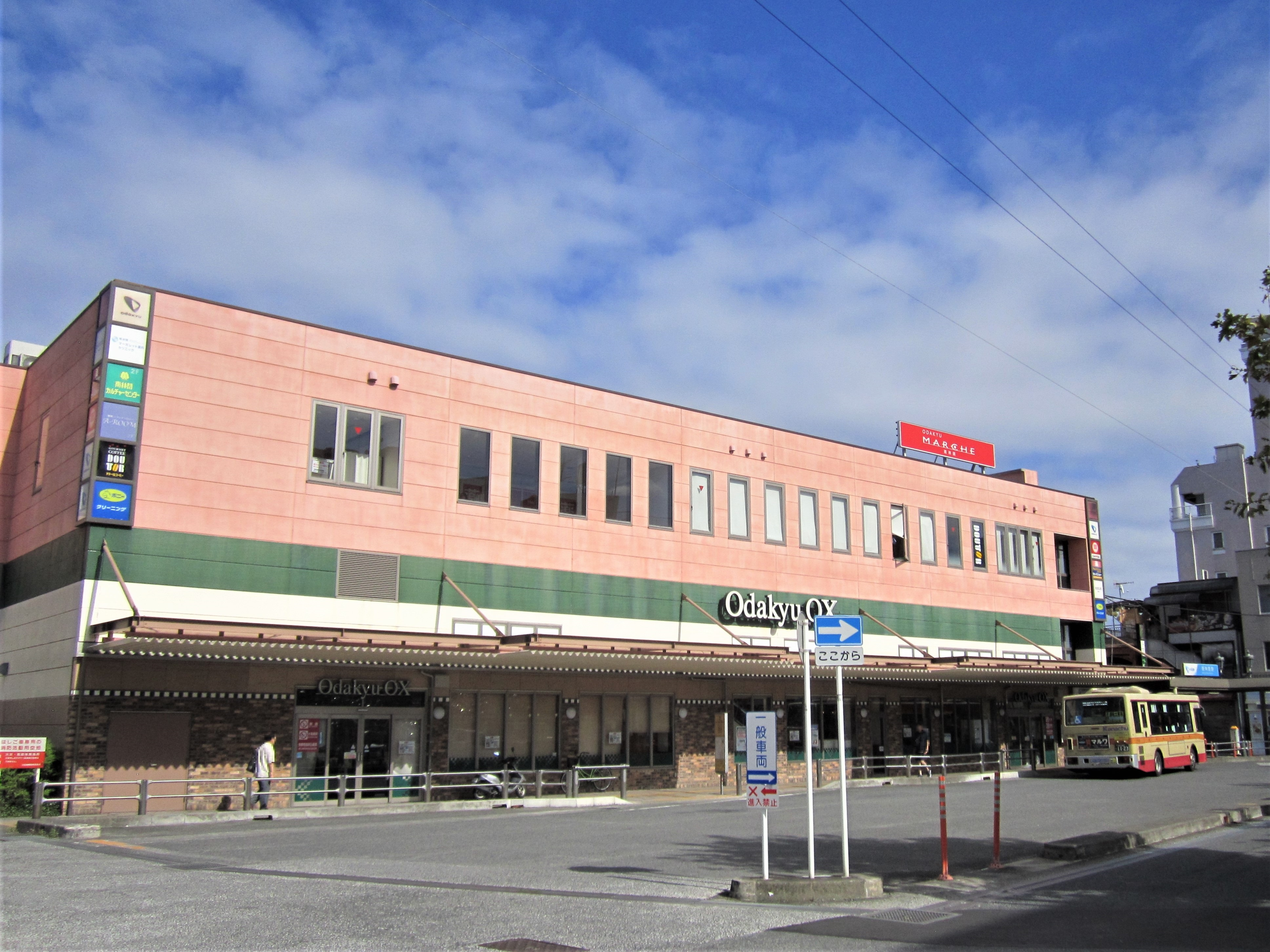 南林間駅西口・Odakyu OX 南林間店